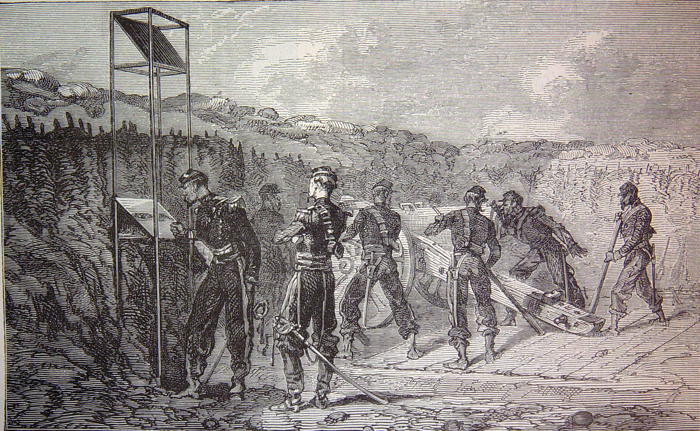 Ilustraciones pertenecientes al libro : El mundo físico : gravedad, gravitación, luz, calor, electricidad, magnetismo, etc. / A. Guillemin. - Barcelona Montaner y Simón, 1882